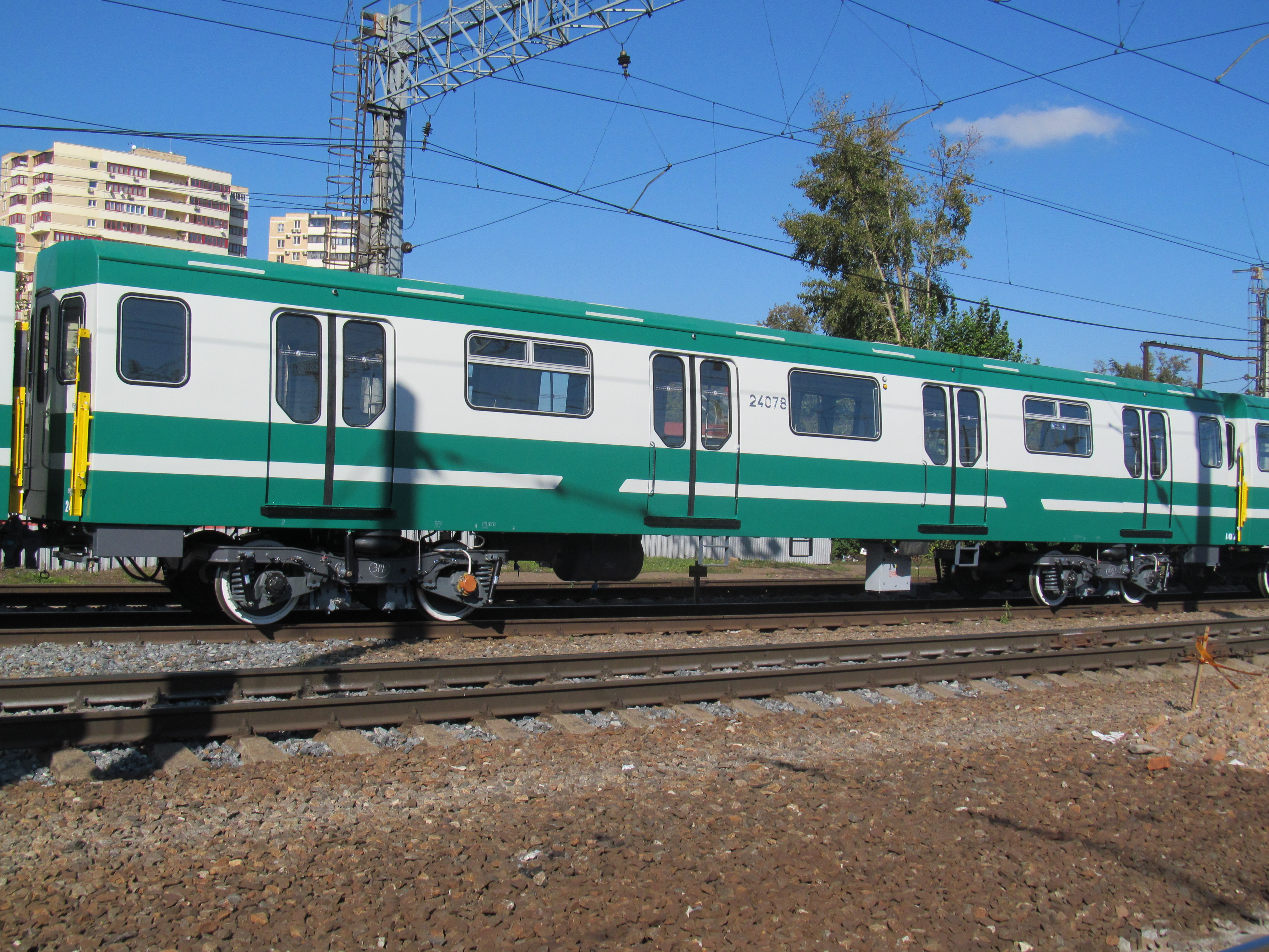 Метровагон 81-724.3 (прицепной промежуточный) № 24078 на станции Мытищи (транспортировка)